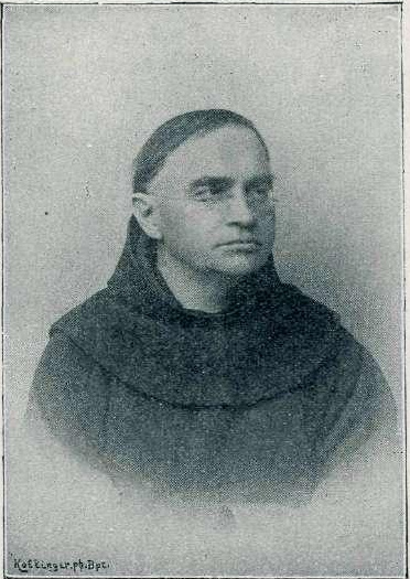 Stanislav Škrabec (1844-1918)